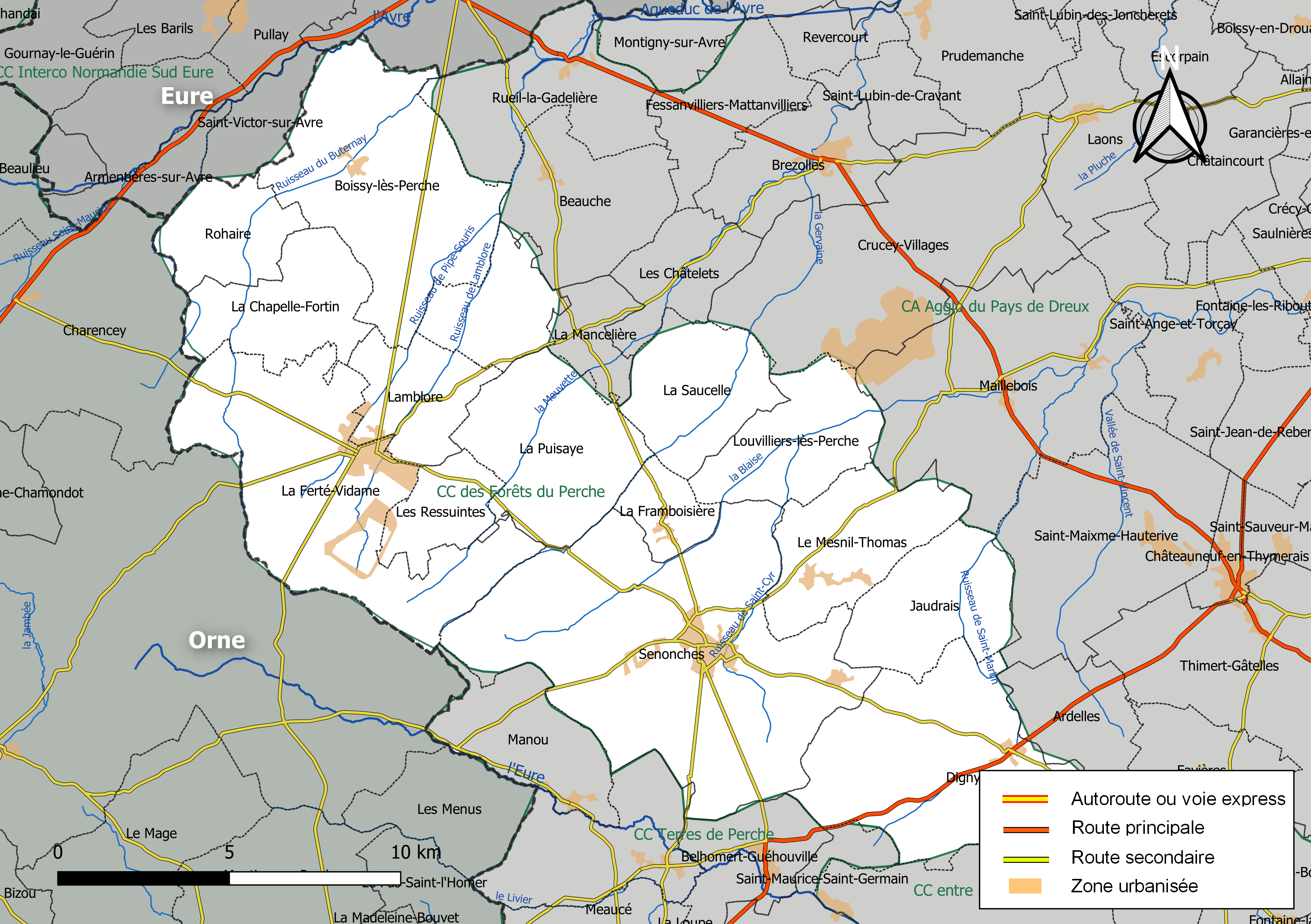 Carte géographique de la communauté de communes des Forêts du Perche, département d'Eure-et-Loir, France. Composition au 1er janvier 2019.